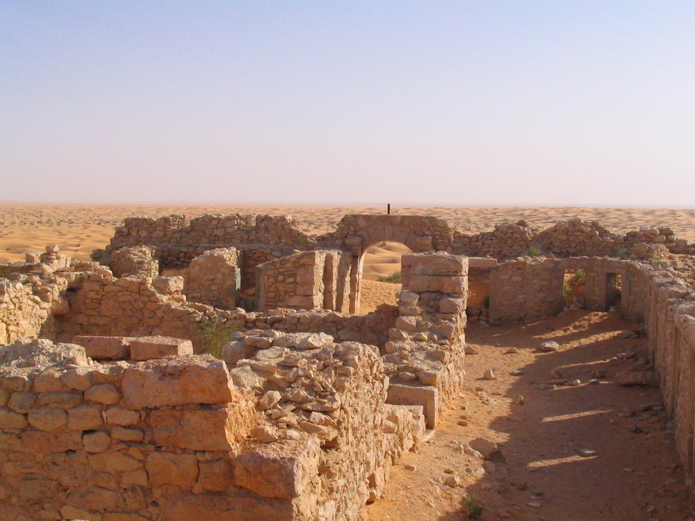 Ruines du fort romain de Ksar Ghilane, Tunisie